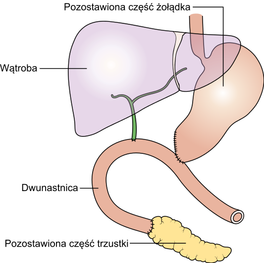 Zespolenia po operacji sposobem Whipple'a